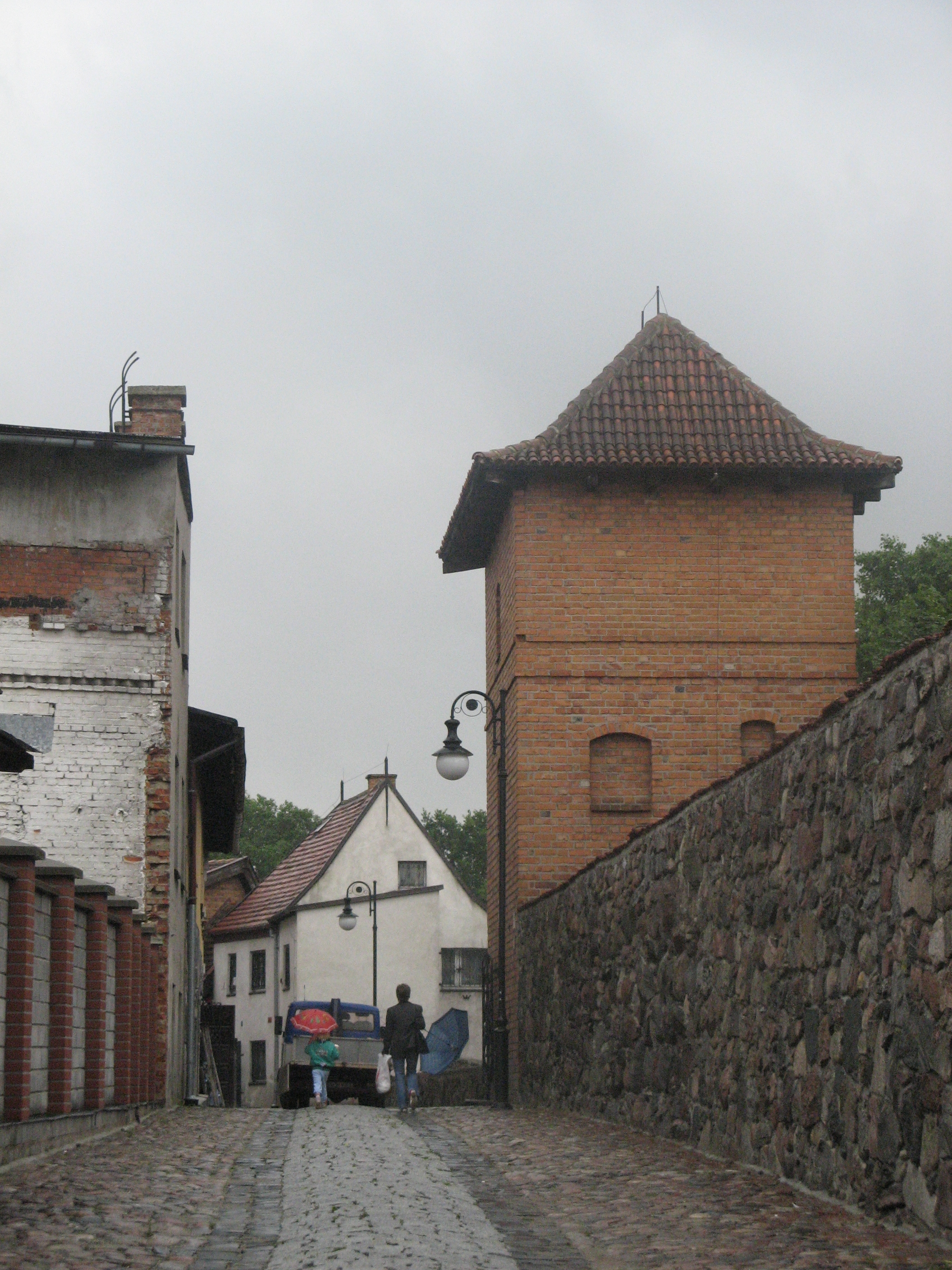 Chojnice - mury obronne z basztami, 2 poł. XIV